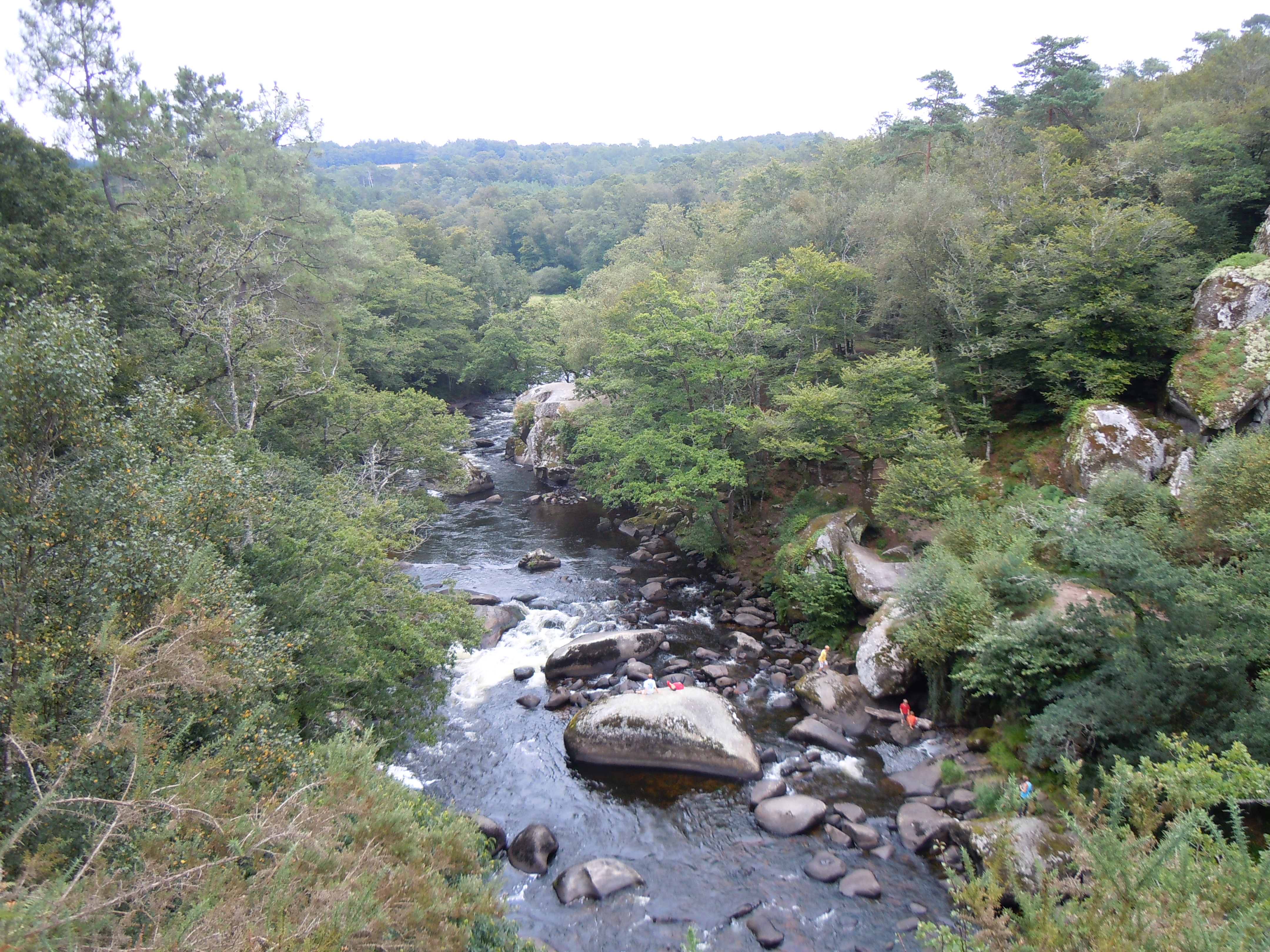 le site des Roches du Diable dans le département du Morbihan, photo prise depuis les hauteurs de Querrien